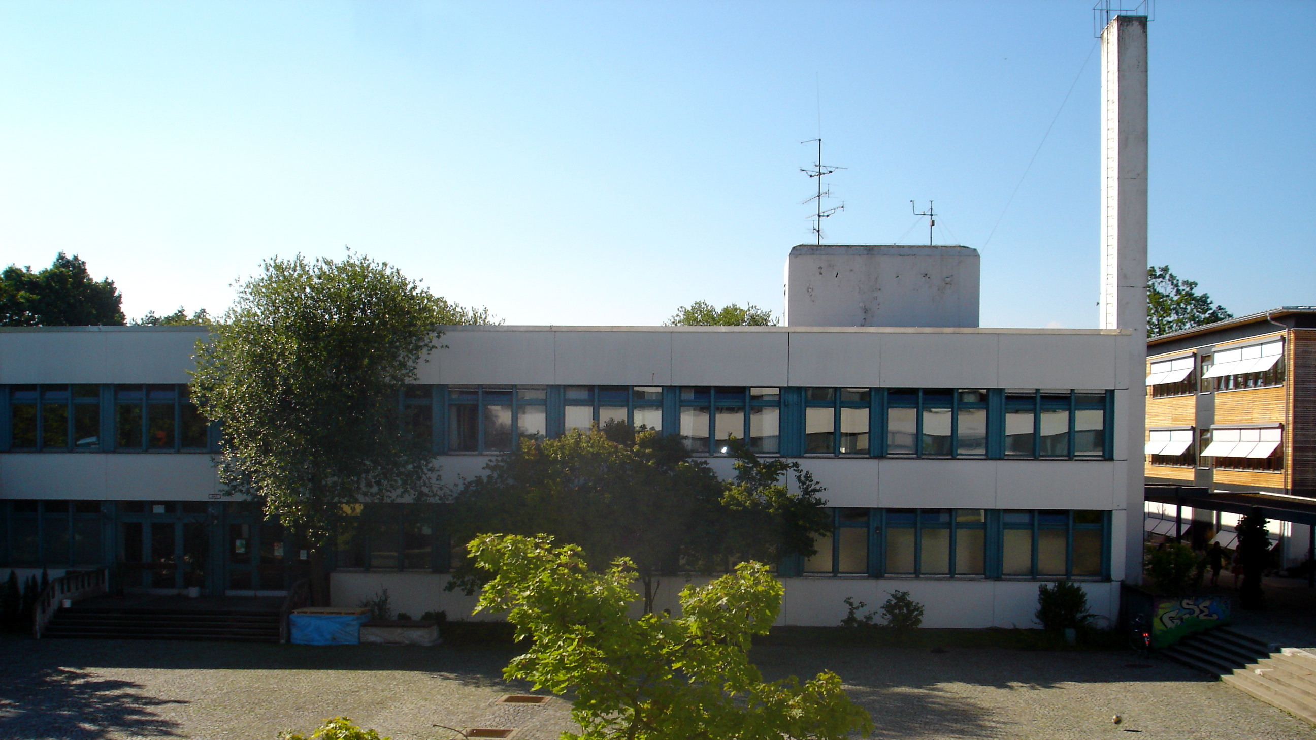 Hauptgebäude des Camerloher-Gymnasiums Freising